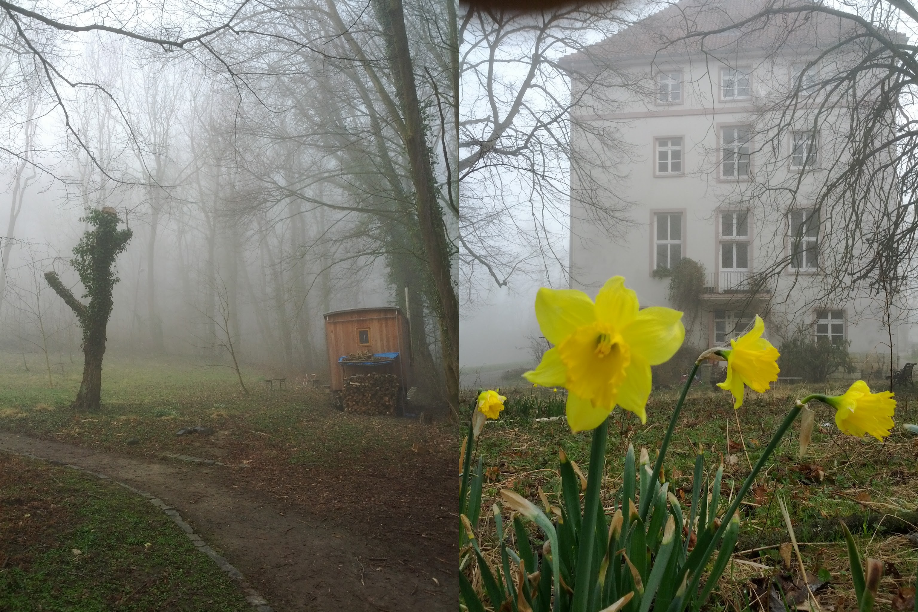 Trillke-Gut Hildesheim, aus Richtung Brehmestraße gesehen